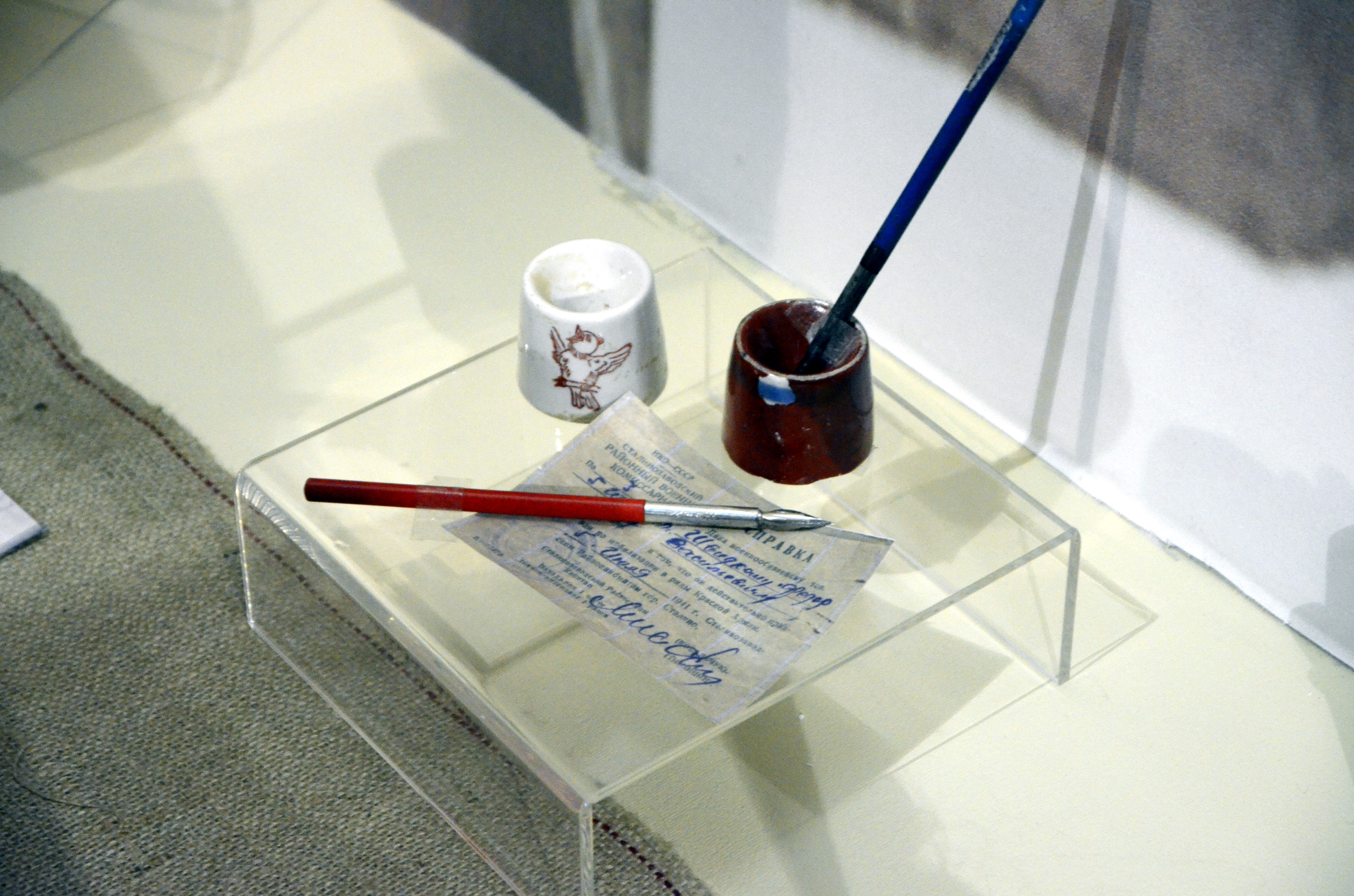 День Победы в Донецке